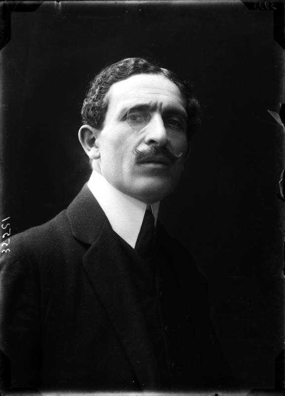 L'attore Alfredo De Antoni fotografato da Mario Nunes Vais